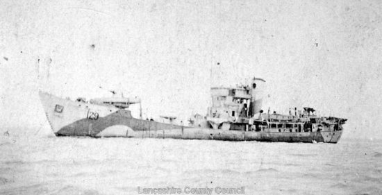 Der in Deutschland gebaute Trawler Northern Spray